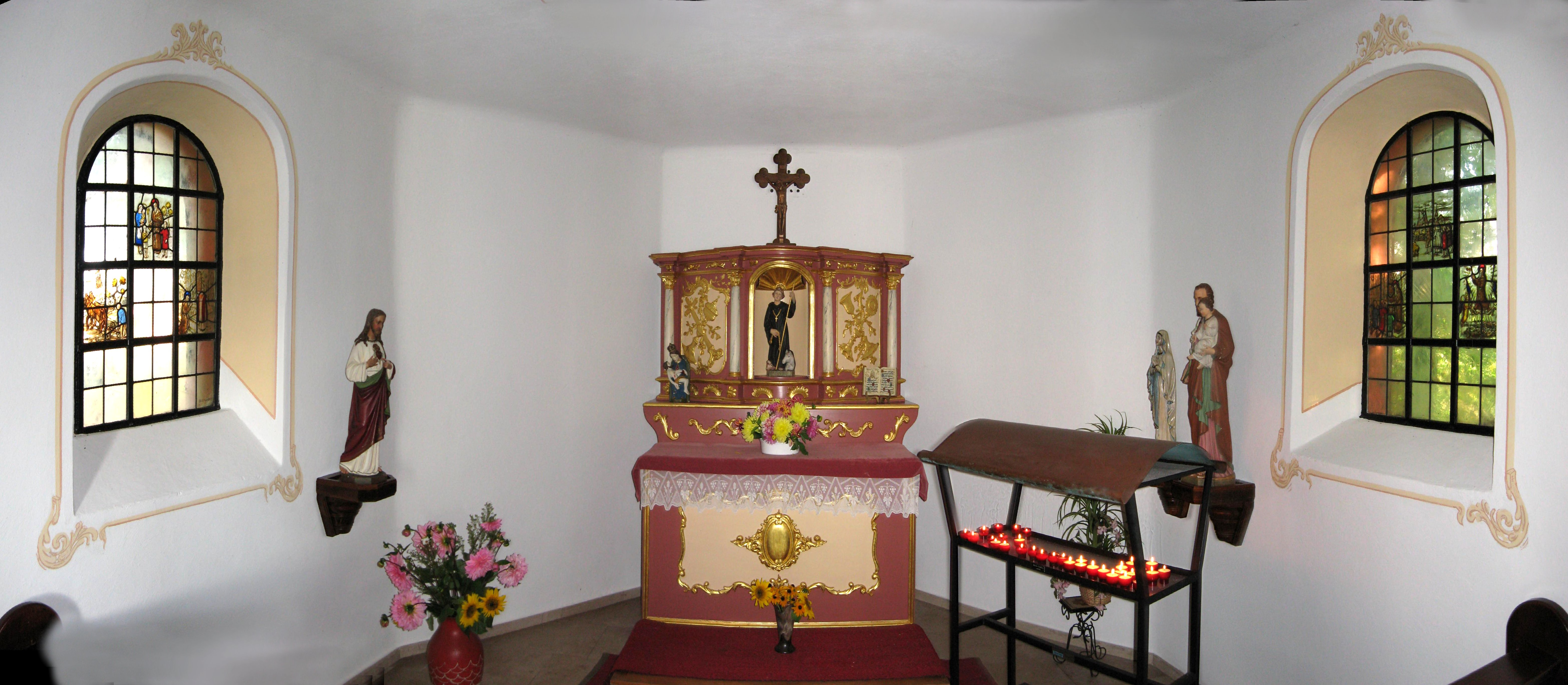 Valelentinuskapelle (Wallenbornkapelle) aus dem 18. Jahrhundert bei Wiesbach (Saar)